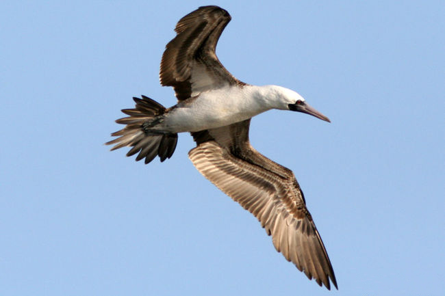 Fou varié (Iles Ballestas, Pérou)